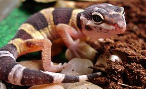 Cria_d'un_drago